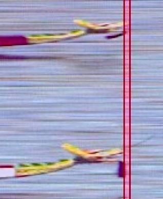 Zielfoto DM 2007. Das All Sports Team Hannover hat weniger als 1/100stel Sekunde Vorsprung vor Drag Attack